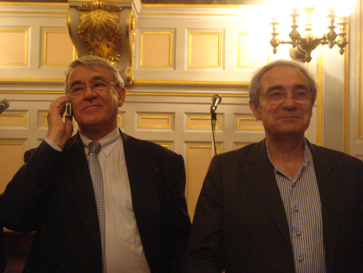 Claude Goasguen, député de Paris, avec Bernard Debré, député de Paris.